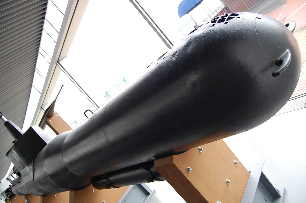 Kaiten Type 10